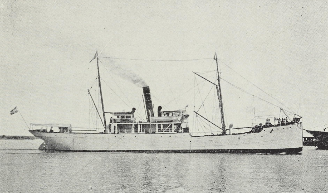 DS Habil